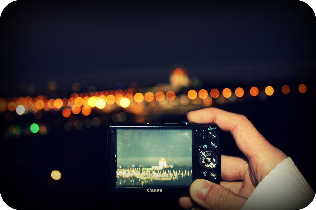 Effect of Bokeh